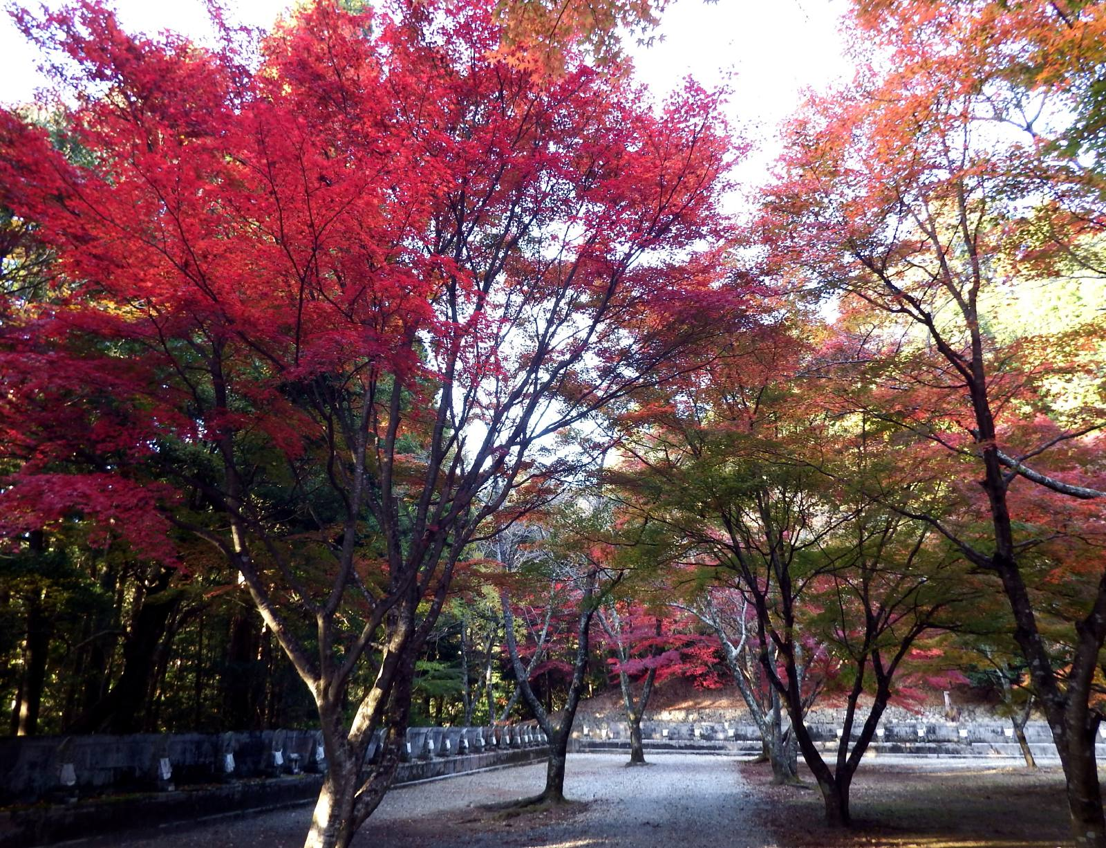 箸蔵寺のミニ八十八